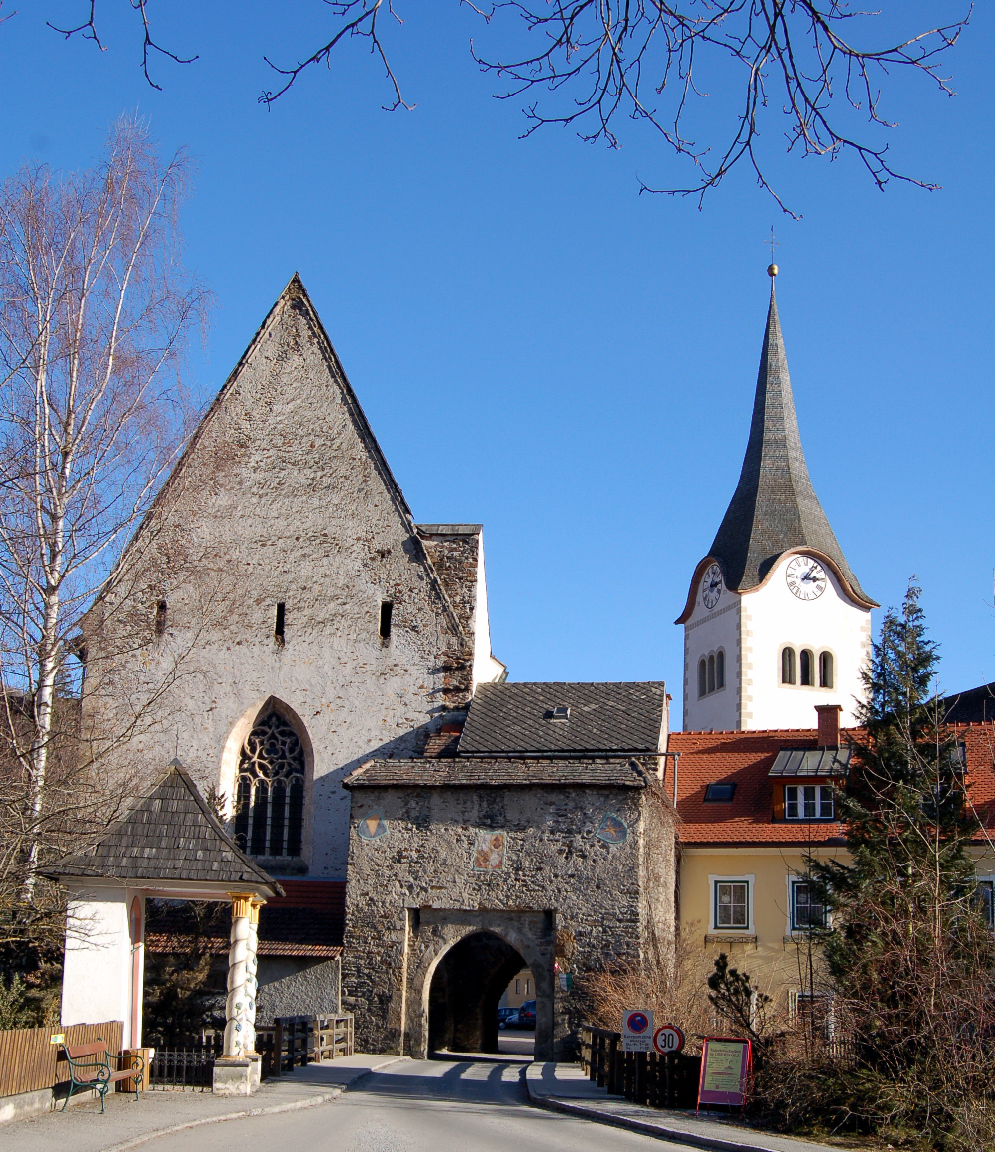 Hintereggertor in Oberwölz, Steiermark. Westseite der Stadtmauer, Brücke über den Schöttlbach, Links Filialkirche St. Sigismund (ehemals Spitalskirche), rechts Pfarrkirche St. Martin